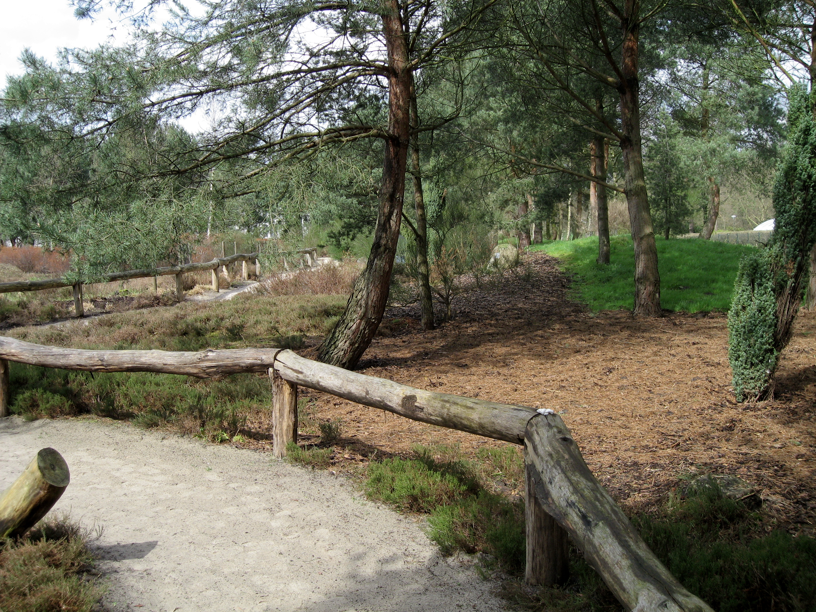 Dortmund, Rombergpark, Heidelandschaft